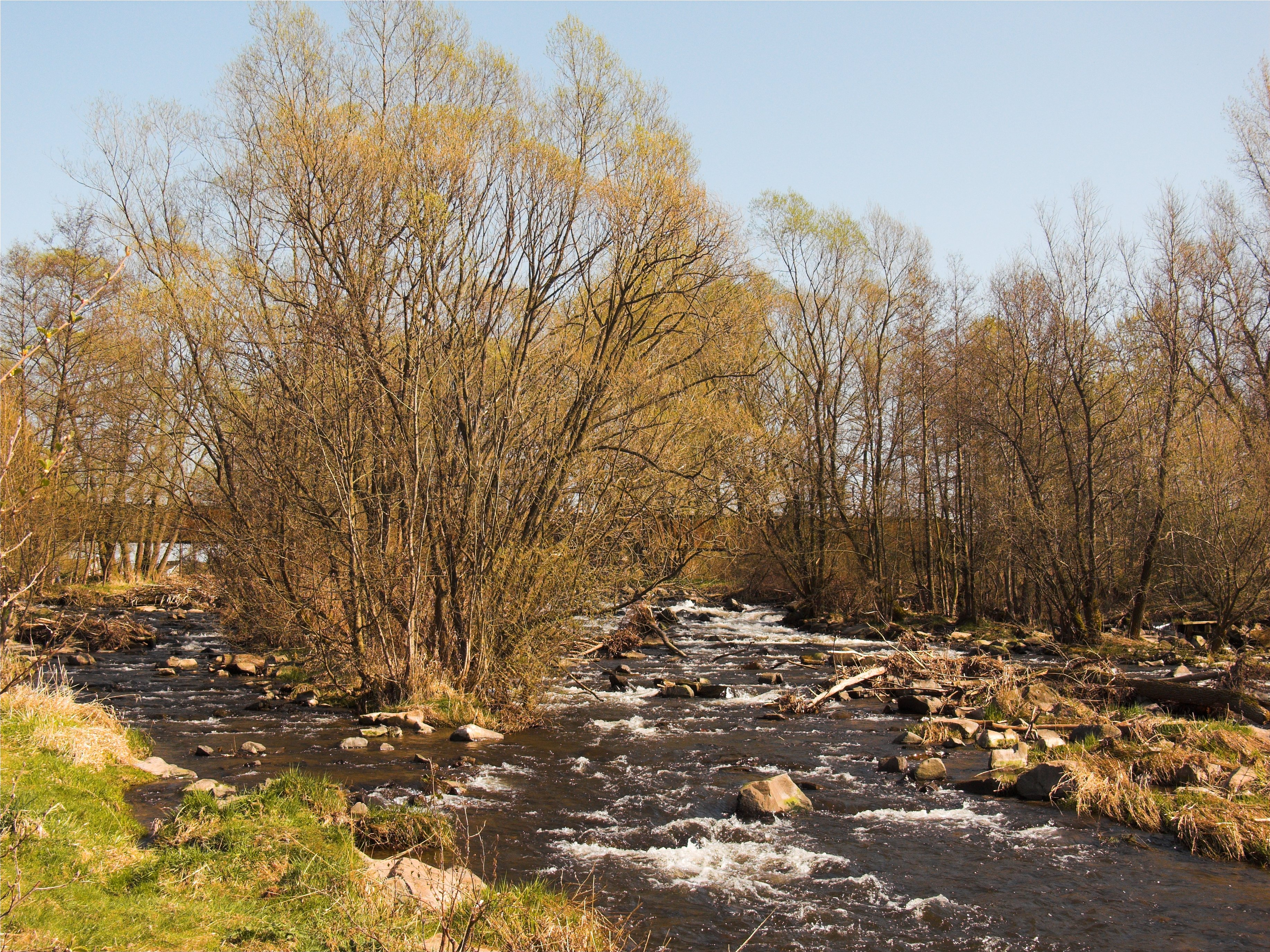 Die Oder nach der Unterquerung der ehemaligen Eisenbrücke bei Wulften, Naturschutzgebiet „Oderaue“